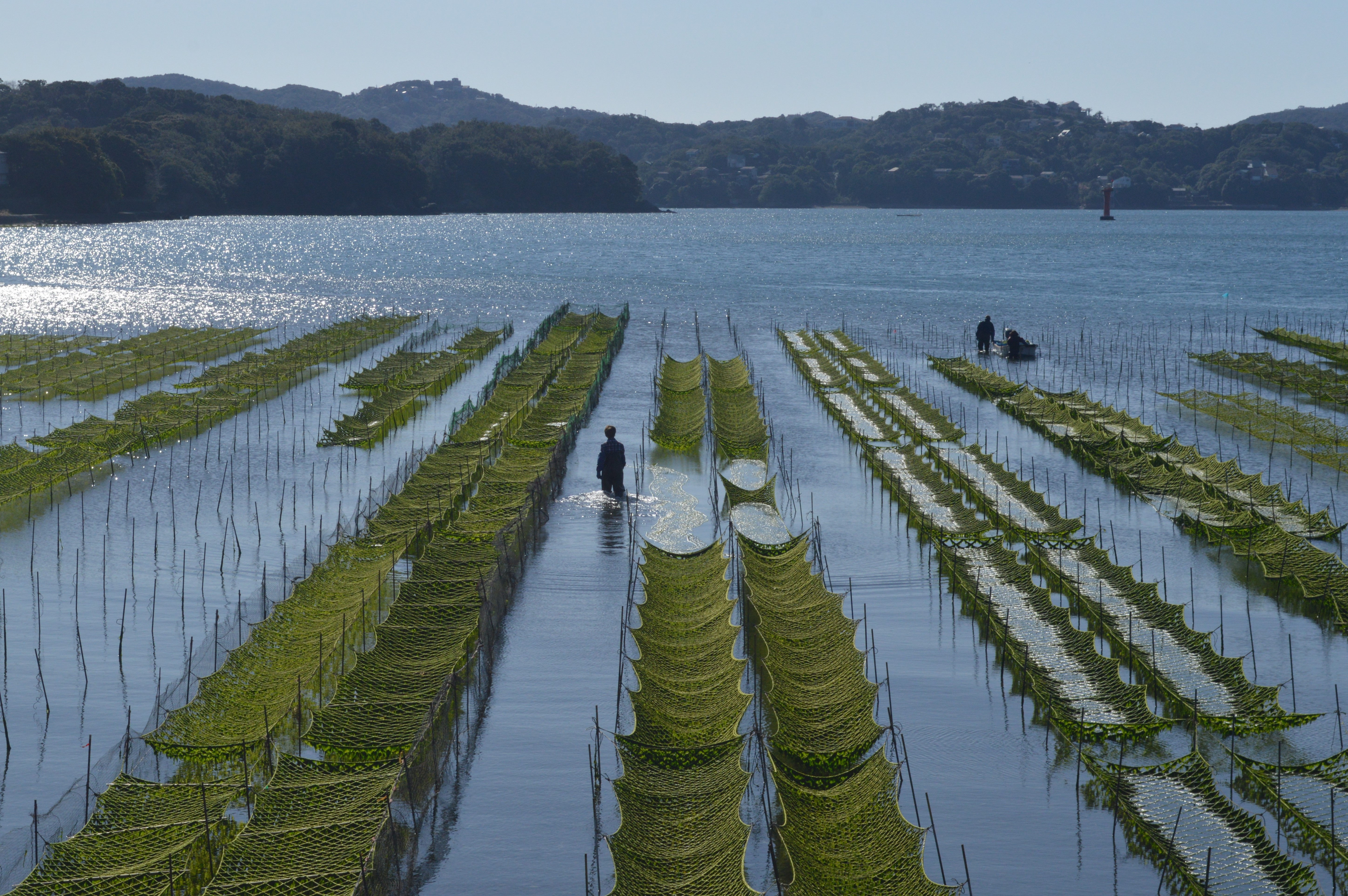 三重県度会郡南伊勢町の五ヶ所港。五ヶ所湾。アオサ海苔の養殖場。